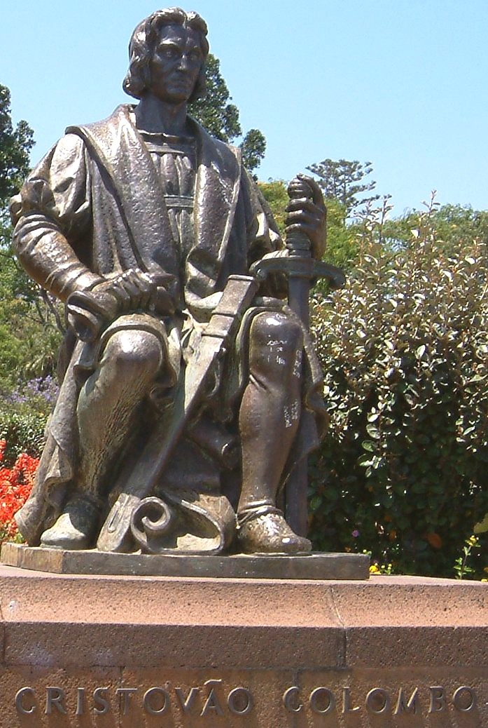 Madeira_Funchal_Kolumbus_5-07. Photograph: Peggy